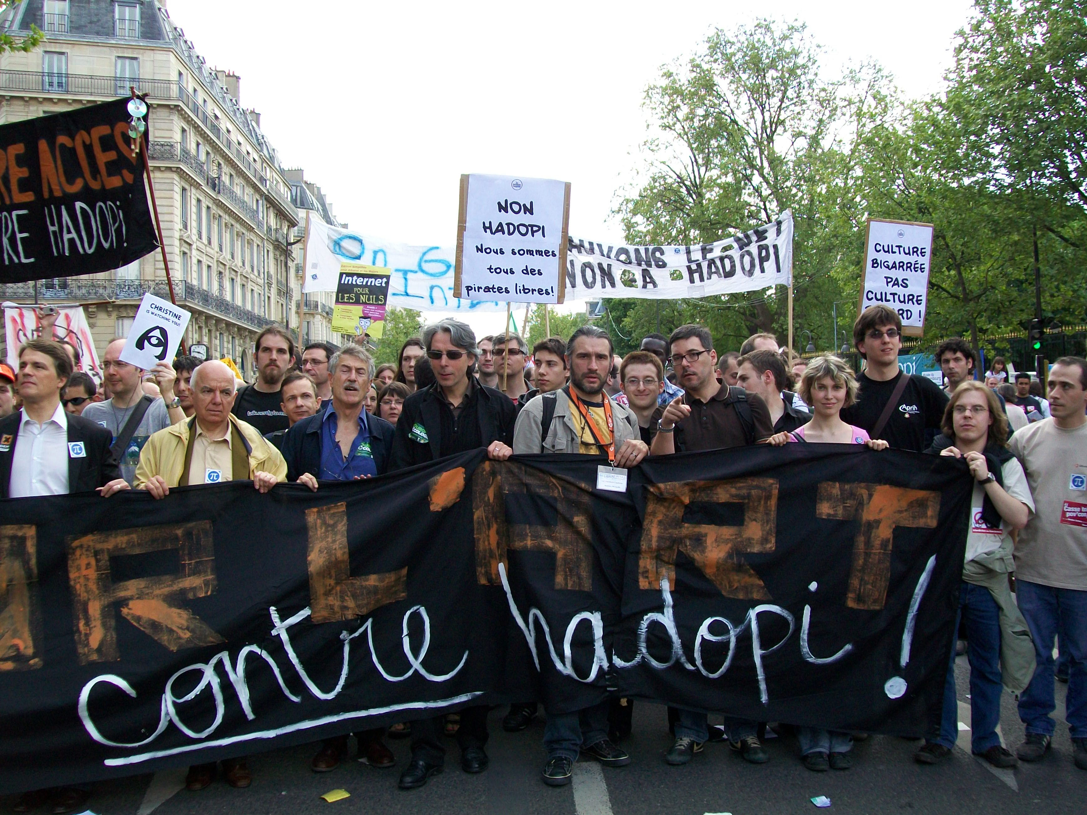 May 1, 2009 in Paris.